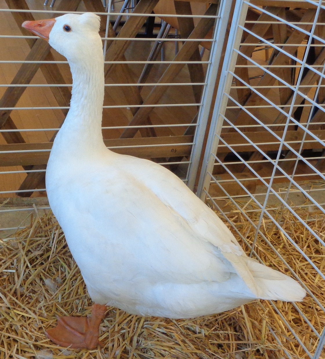 Jars normand de Bavent